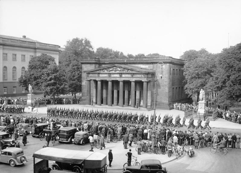 Berlin; Reichsehrenmal Neue Wache ca. 1938